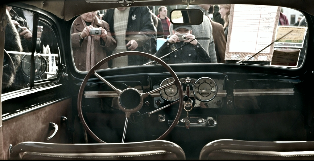 Moskvich 400